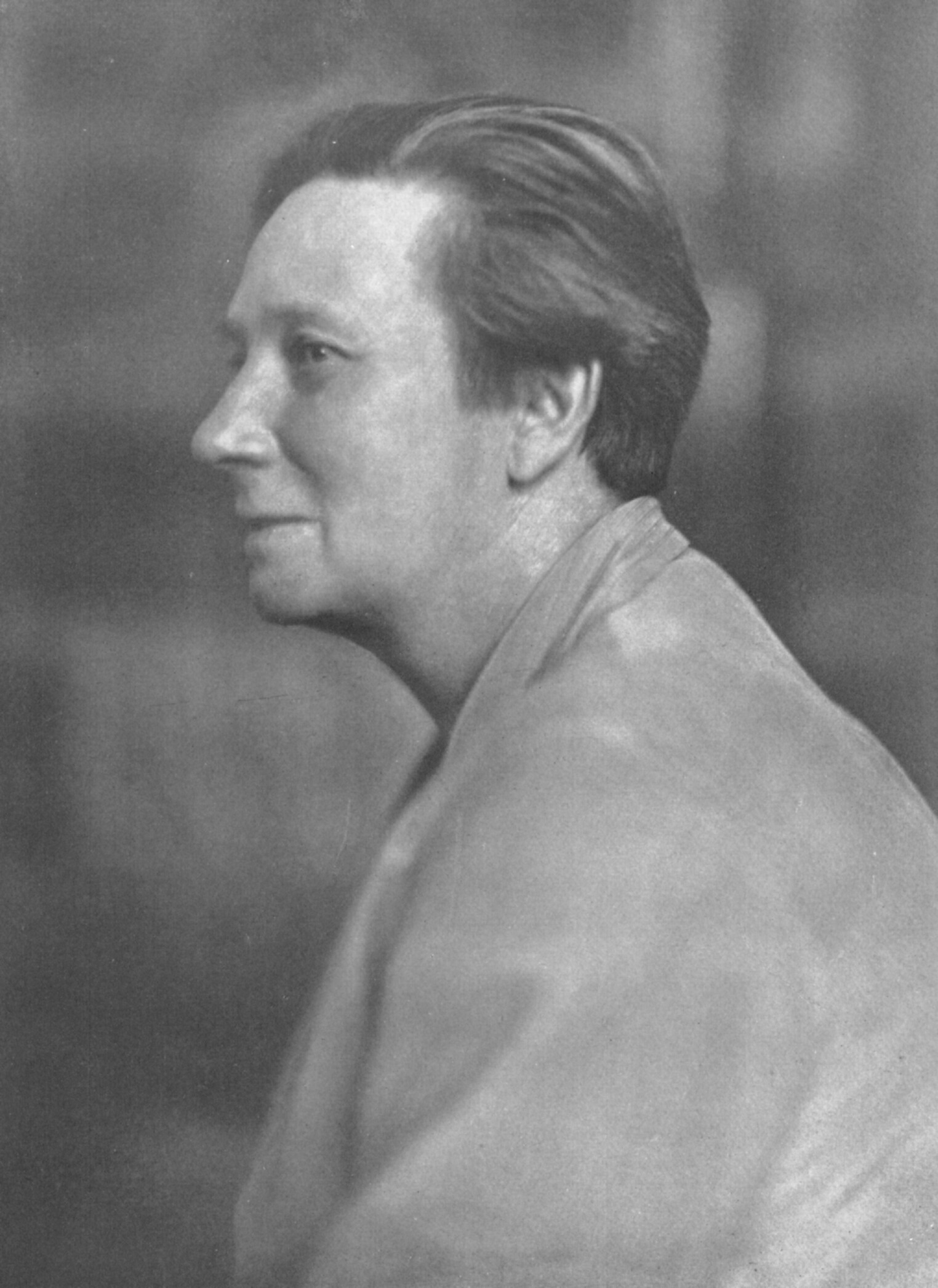 Porträt Rhoda Erdmann, Foto von Wanda von Debschitz-Kunowski (1870-1935)